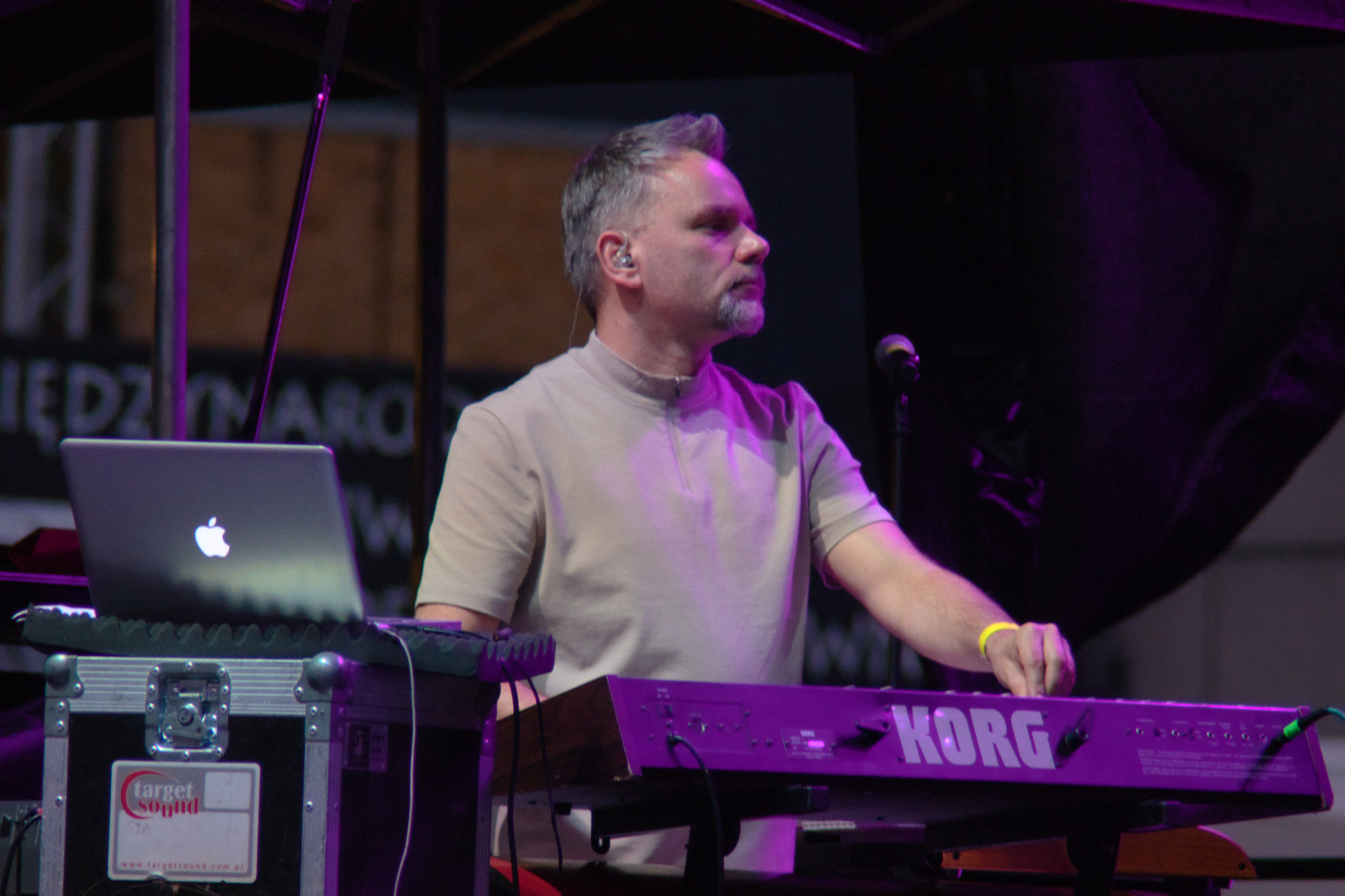 Miłosz Wośko podczas plenerowego koncertu SBB i gości „Wolność z nami” w Katowicach, na placu Sejmu Śląskiego (wstęp wolny)